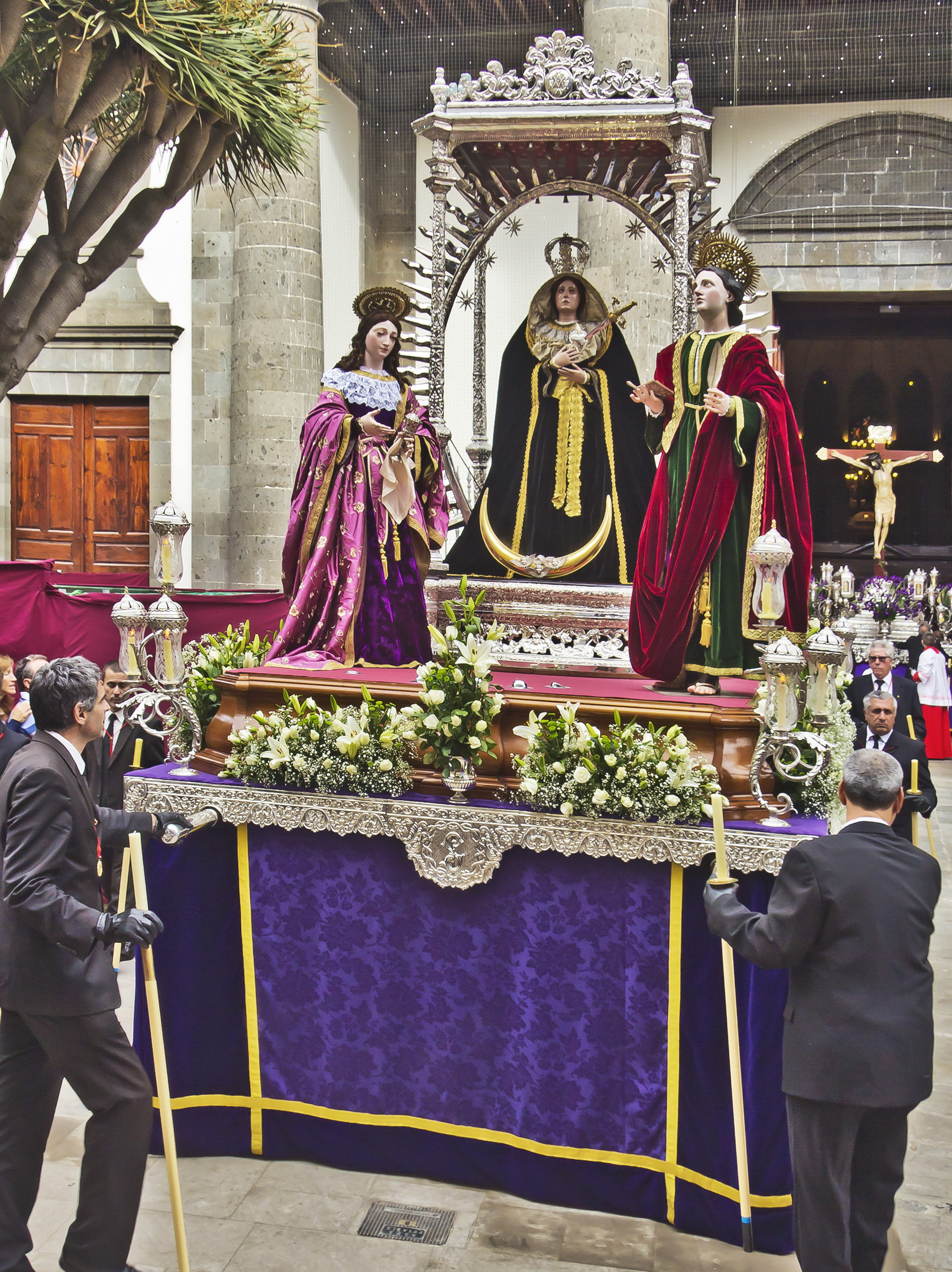 Paso de la Dolorosa, San Juan y Magdalena